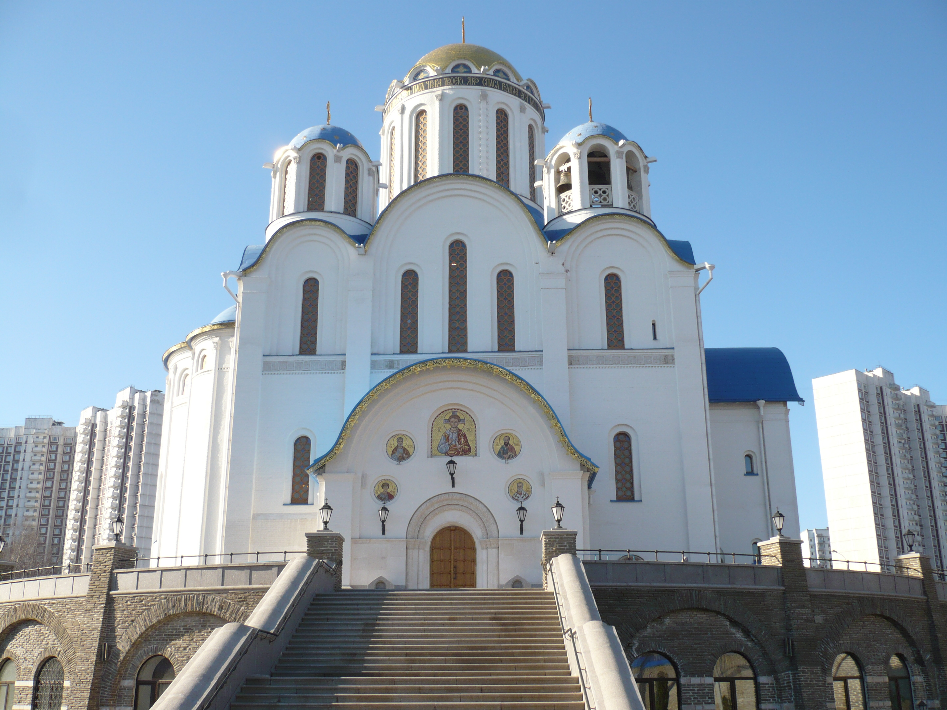 Храм Покрова Пресвятой Богородицы в Ясенево